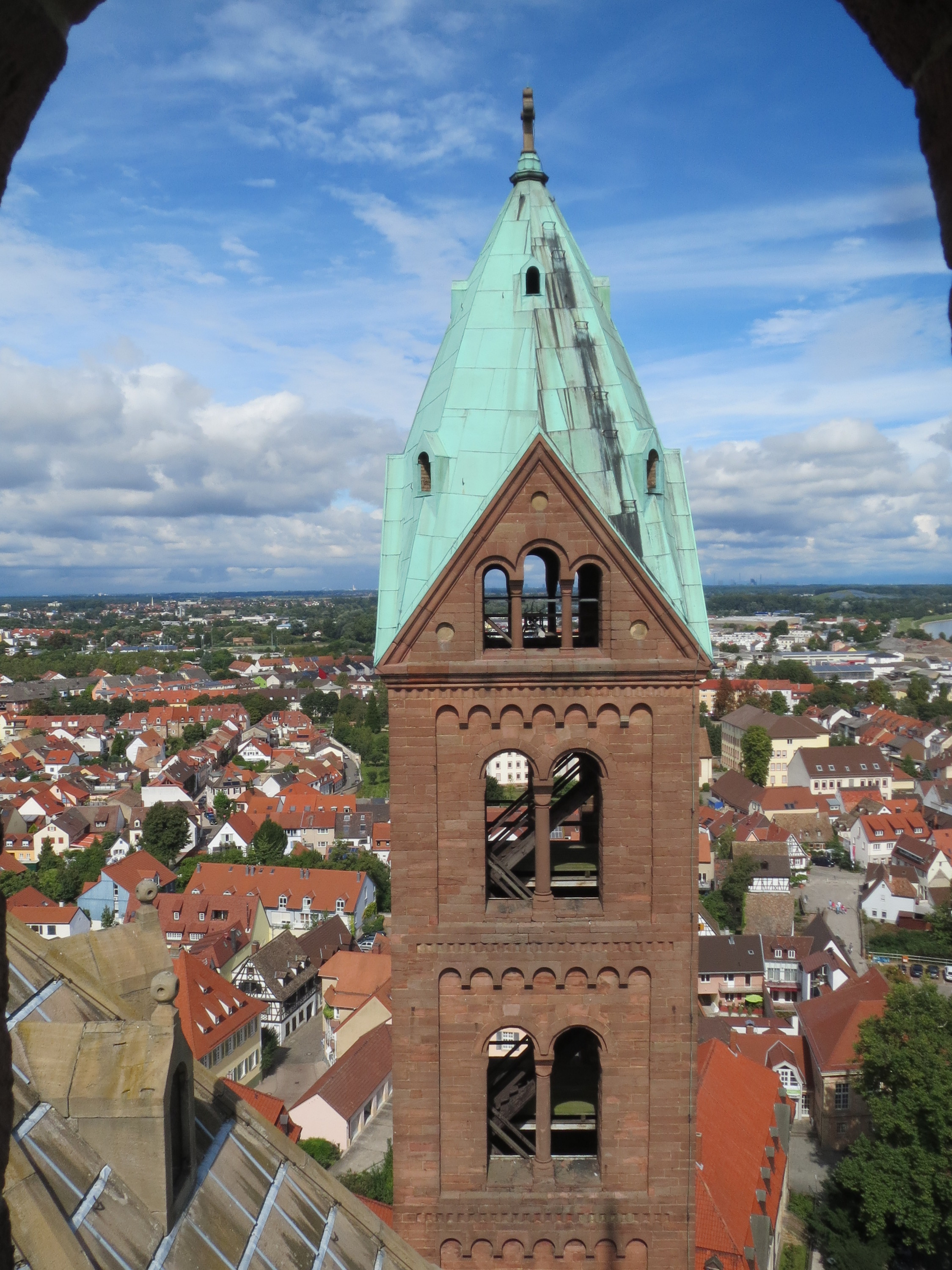 Blick vom Domturm Speyer